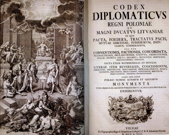 Дыпламатычны кодэкс